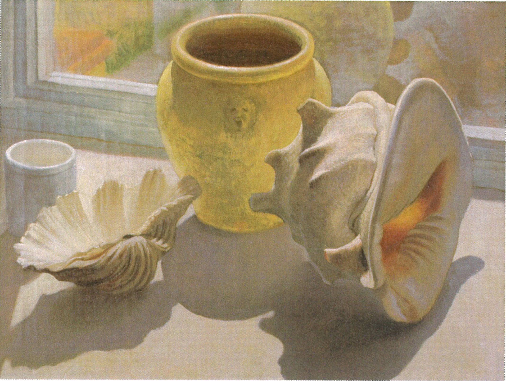 Natura morta del pittore fiorentino Federico Angeli, 1934. Tempera su tela 37x51